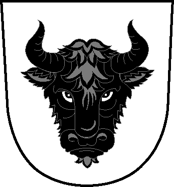 Znak Osové Bítýšky